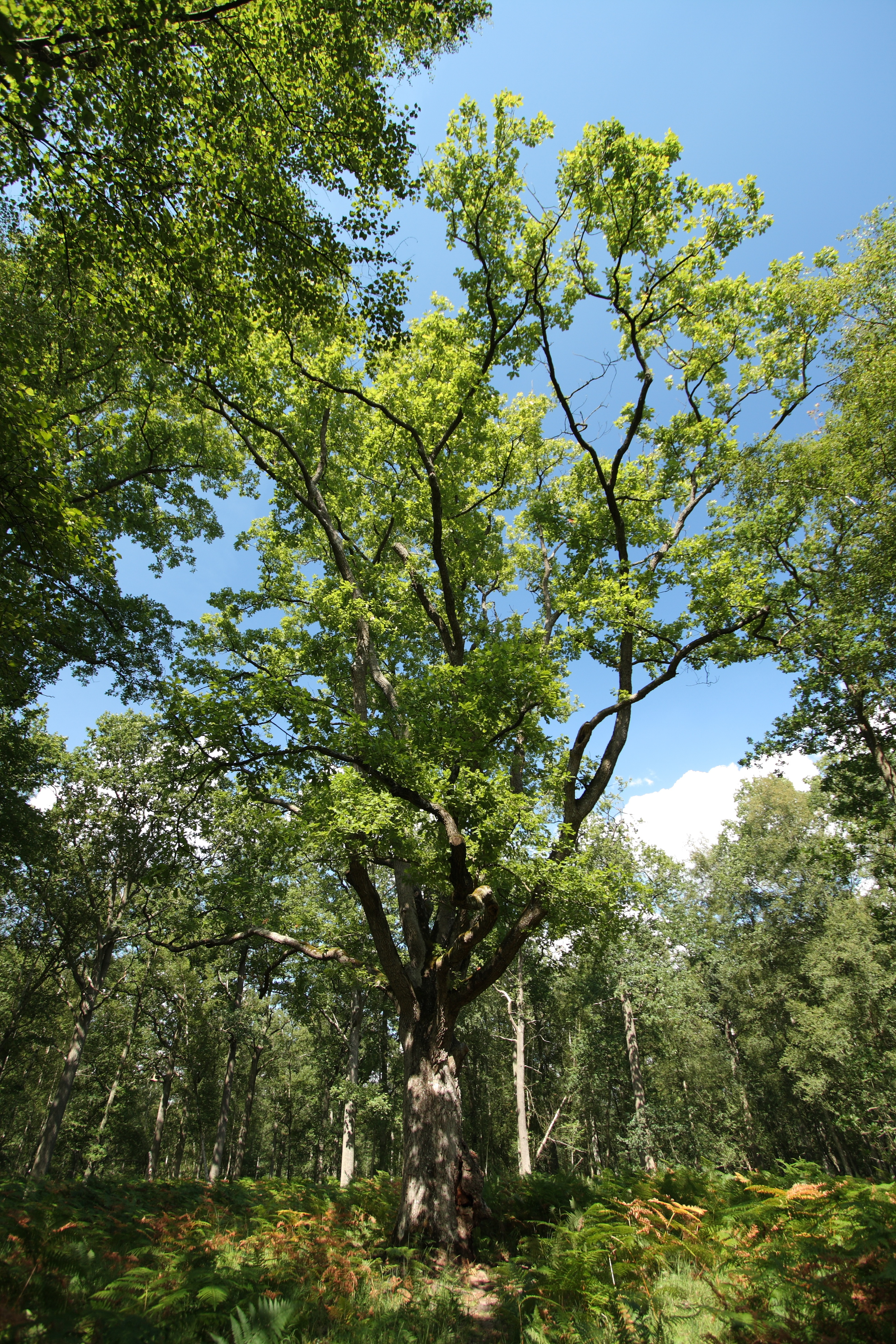 Le chêne des grès, dans la forêt de Pontarmé. Essence : chêne sessileHauteur totale : 23mDiamètre à 1m30 du sol : 146cmÂge : environ 300 ans